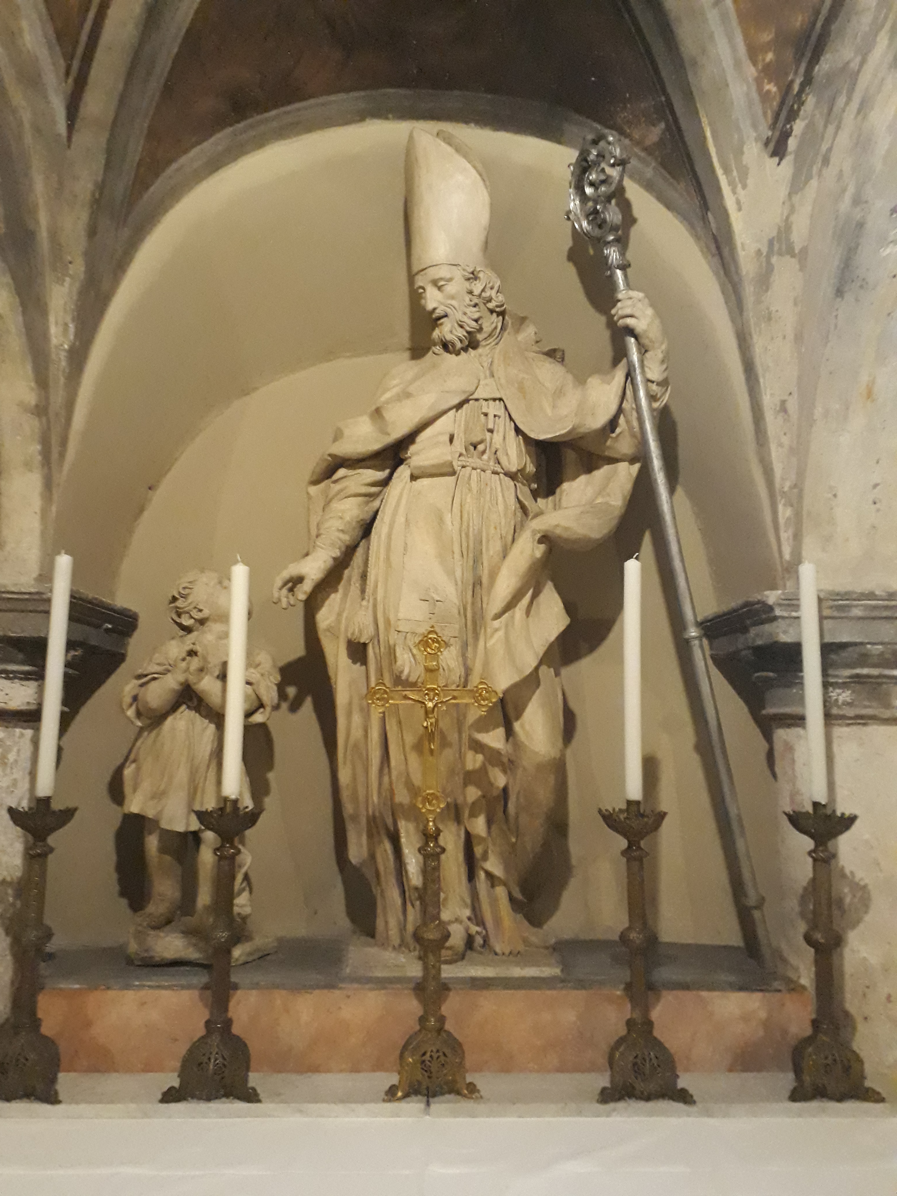 La statua di San Biagio (Ascoli Piceno), opera di Domenico Paci della prima metà del 1800, prima era nell'omonima chiesa demolita nel 1887, poi trasferita nella cripta di Sant'Emidio.